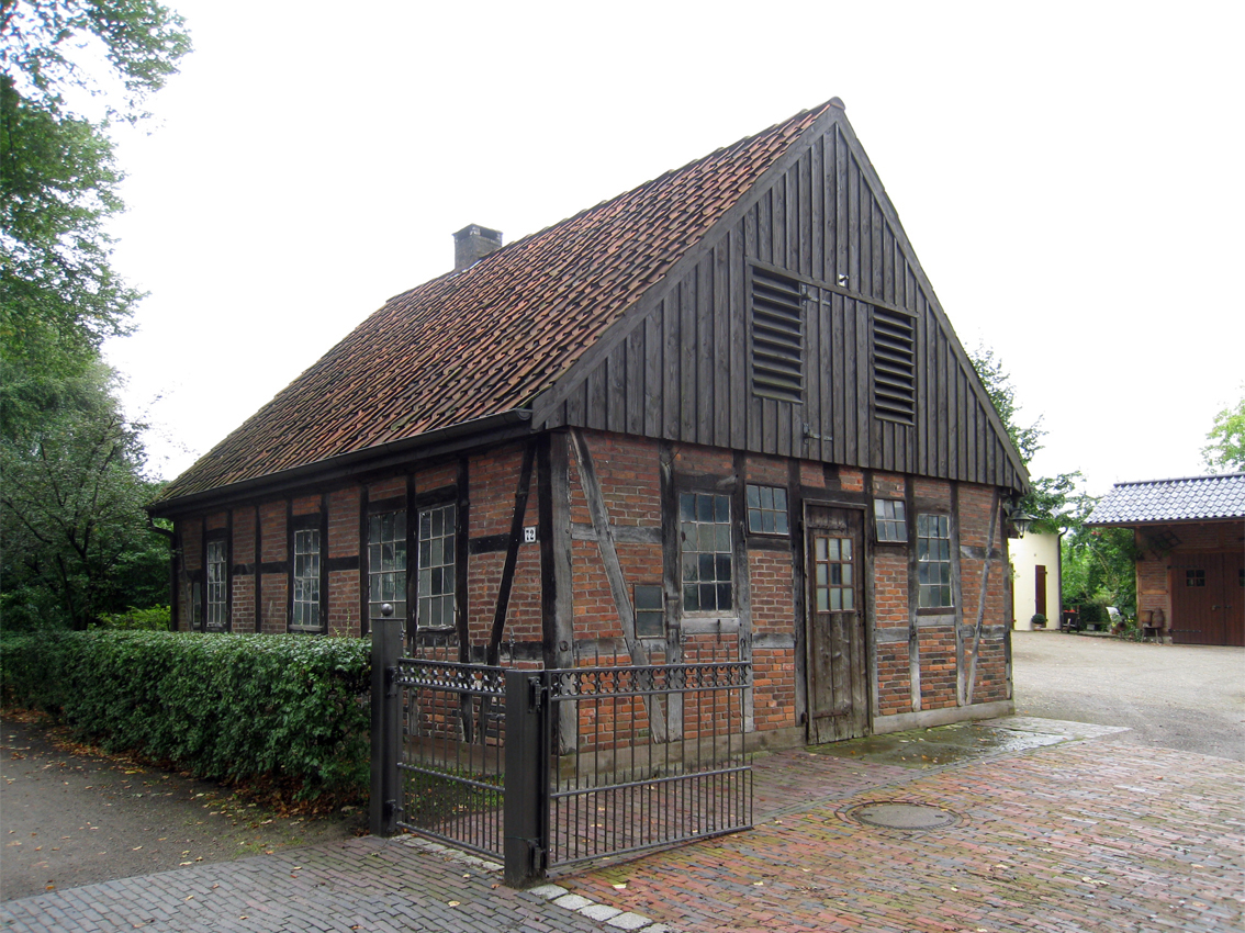 Schmiede Oberneuland und Wohnhaus in Bremen, Oberneulander Heerstraße 72.Das abgebildete Objekt ist ein geschütztes Kulturdenkmal in der Freien Hansestadt Bremen, mit der Nr. 0940 beim Landesamt für Denkmalpflege registriert.